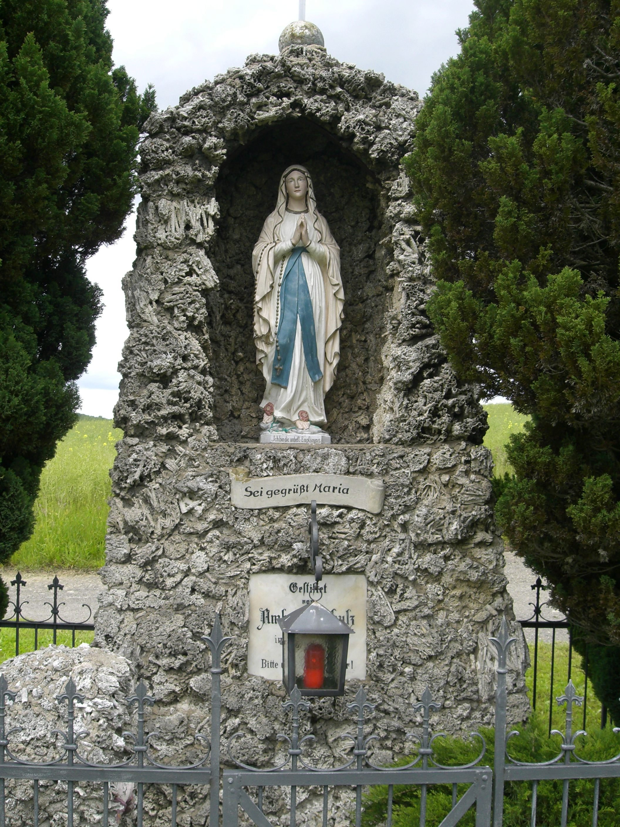 Grotte auf dem Weg zwischen Schwemmelsbach und Greßthal.